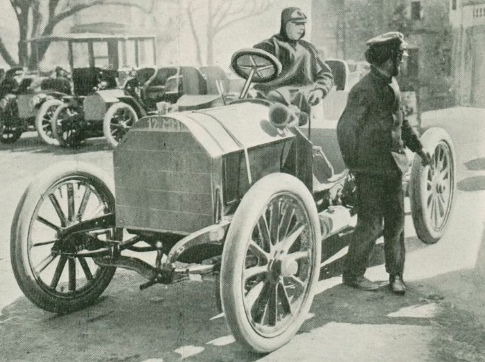 Otto Hieronimus, vainqueur en avril 1903 à La Turbie, sur Spitz - La Vie au Grand Air du 11 avril 1903, p.226